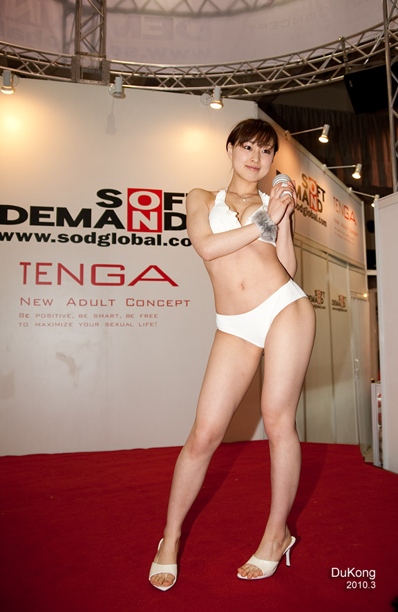 sod av女优 周防ゆきこ 周防雪子 Yukiko Suo